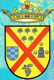 escudo san juan